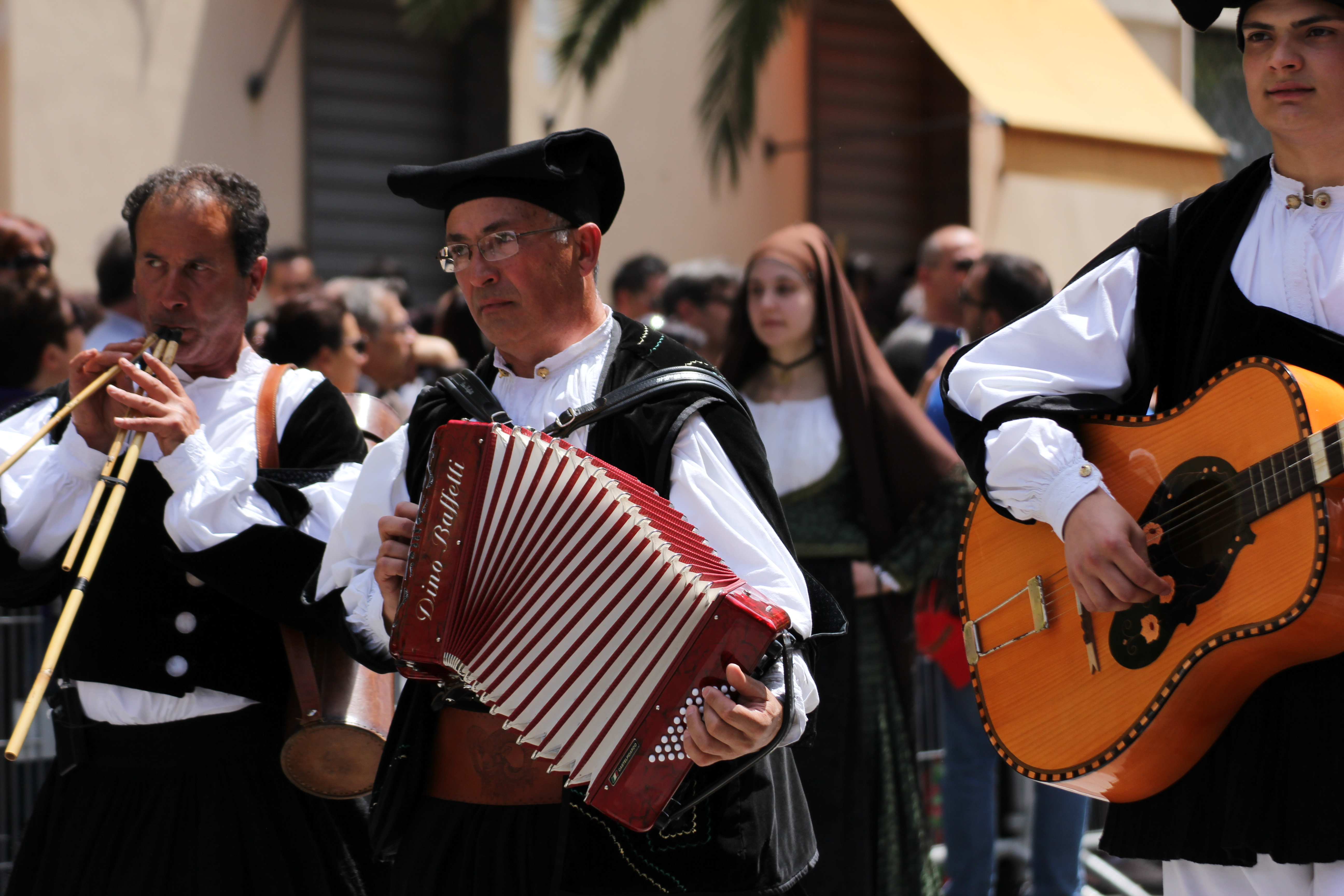 Costume tradizionale